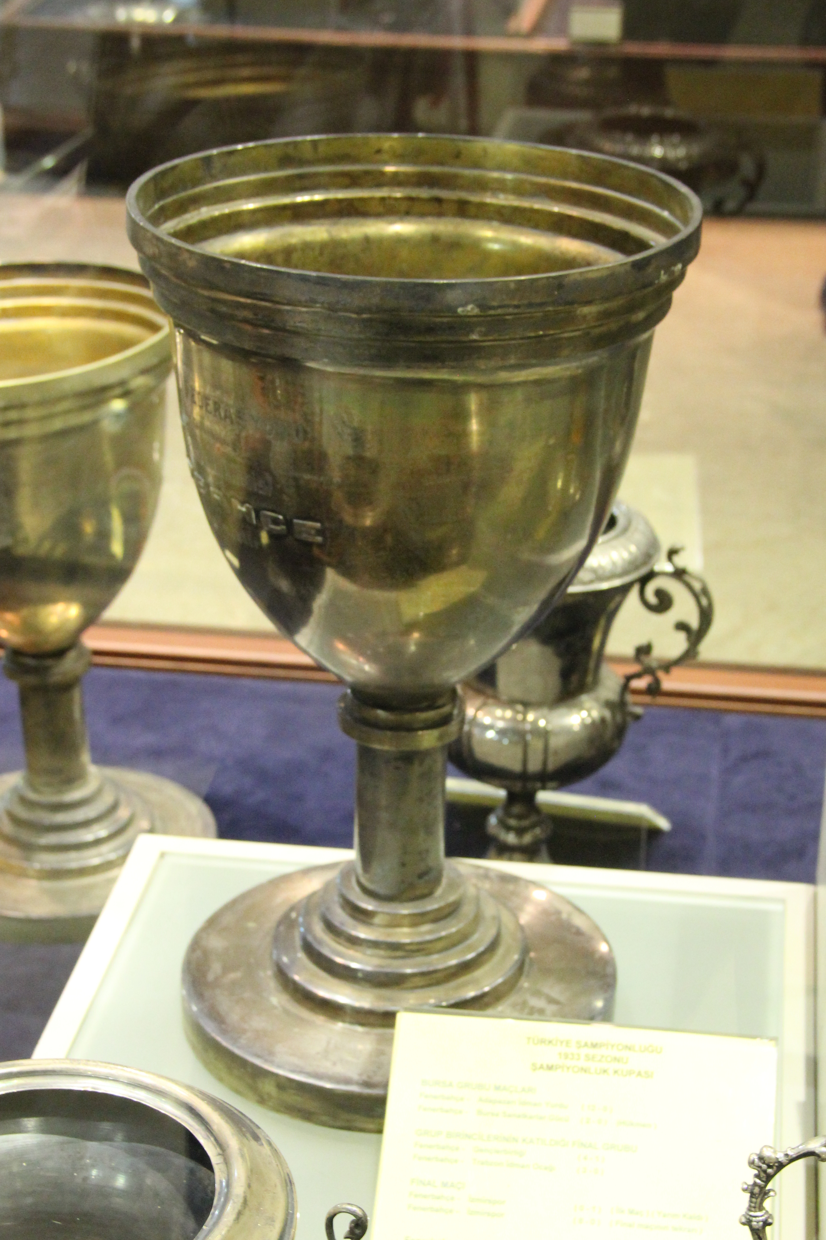 1932–33 Istanbul Football League Cup